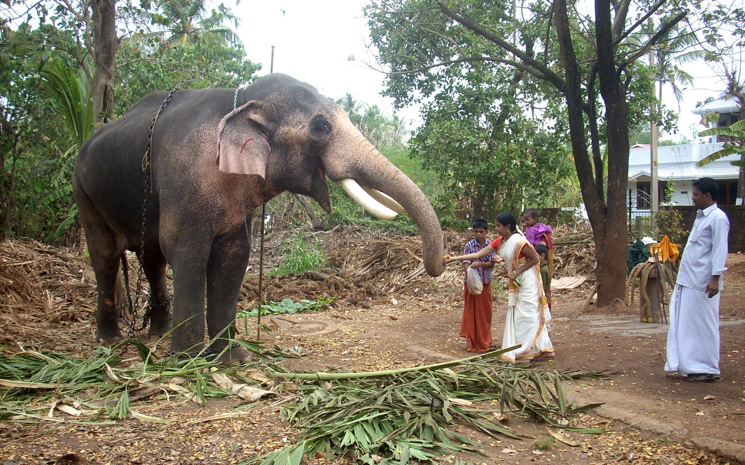 കേരളത്തിലെ തൃശ്ശൂർ ജില്ലയിലെ പേരാമംഗലത്തുള്ള തെച്ചിക്കോട്ടുകാവ് ക്ഷേത്രത്തിന്റെ ആനയാണ് തെച്ചിക്കോട്ടുകാവ് രാമചന്ദ്രൻ. ഇന്ന് കേരളത്തിൽ ജീവിച്ചിരിക്കുന്നവയിൽ ഏറ്റവും ഏറ്റവുമധികം ഉയരമുള്ള ആനകളിൽ ഒന്നാണിത്. ഏഷ്യയിൽ ഉയരത്തിൽ ഇതിന് രണ്ടാംസ്ഥാനമാണ്.